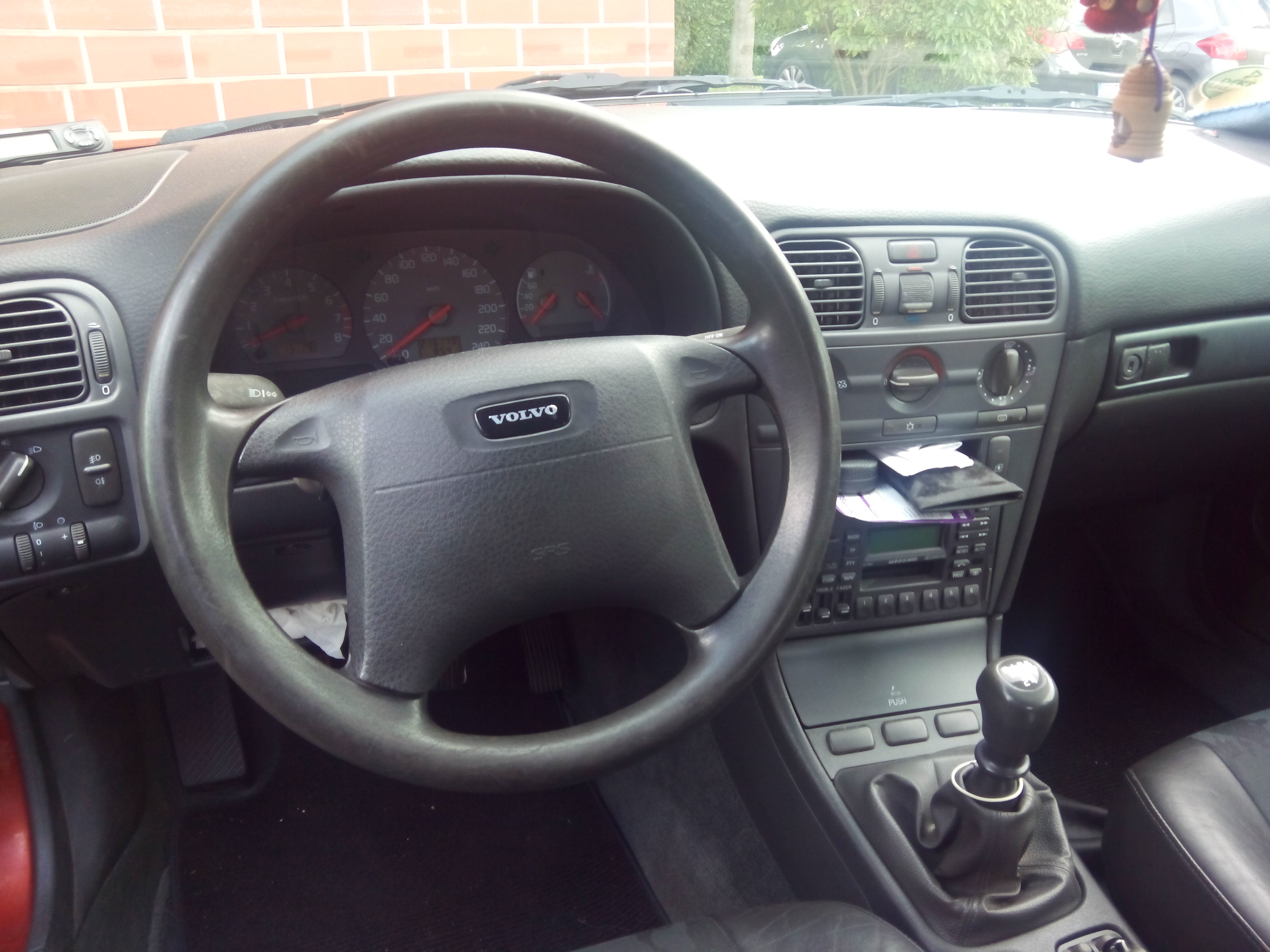 Interior eines Volvo V40 1.8, 116 PS, Baujahr 1998